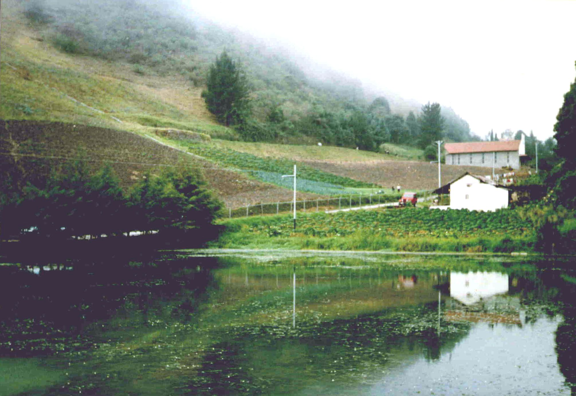 La lagunita en en año 1.990 en la poblacion de La Puerta nunicipio Valera estado Trujillo Venezuela